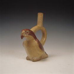 Aguila Mochica. Museo Larco.